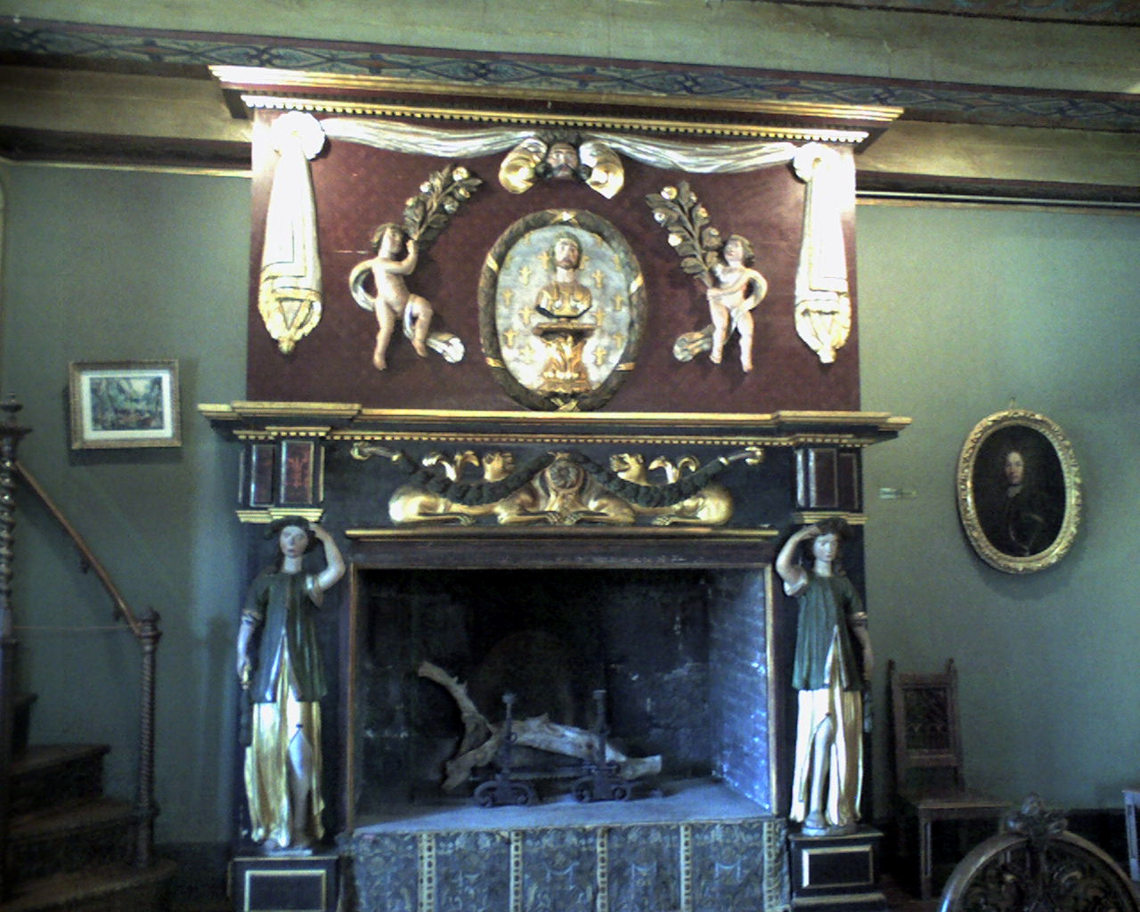 Kamin im Schloss Val